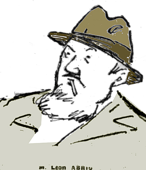 portrait de Léon Abril dans Comoedia di 6 mai 1921